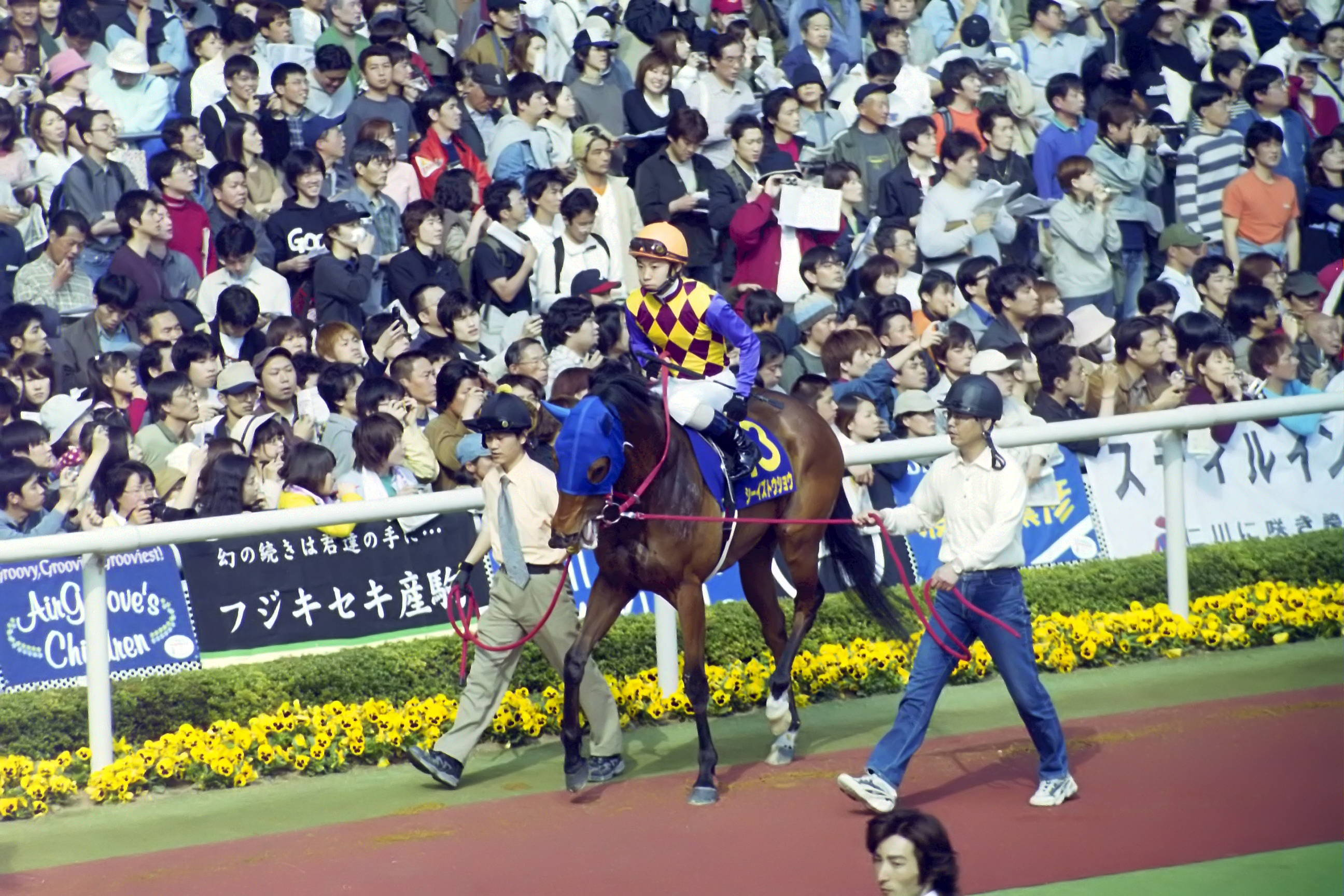 シーイズトウショウ号